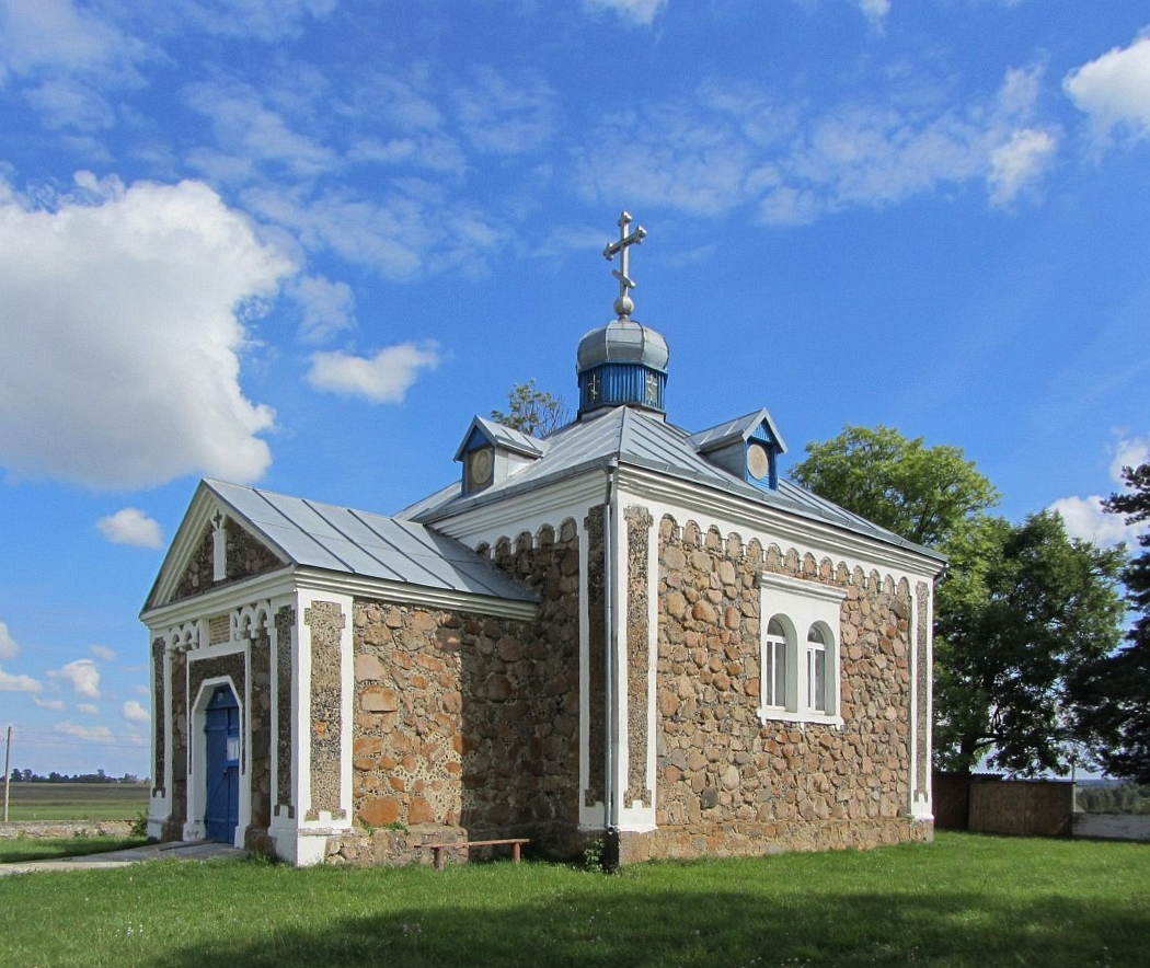 Царква ў Вялікіх Князікоўцах